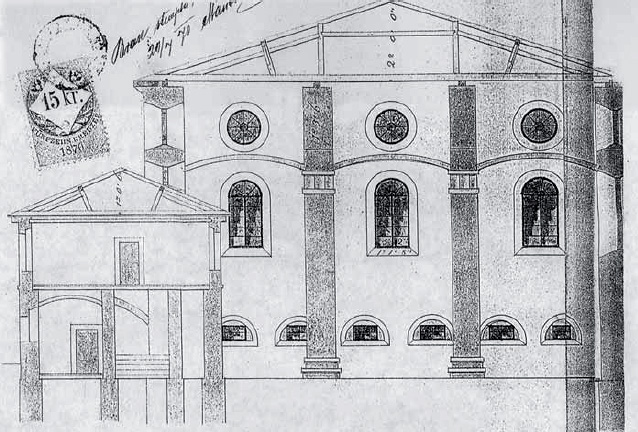 Проект перебудови Великої передміської синагоги у Льові. Архітектор Міхаель Герль. 1870 рік.